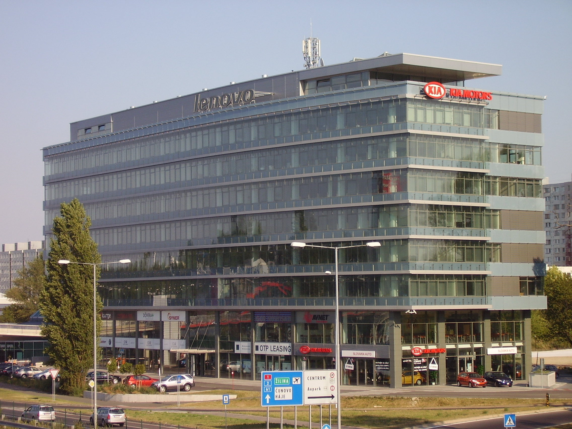 Bratislava